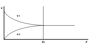 自己用Photoshop制作的，是电离平衡的示意图。